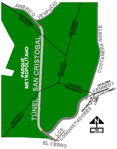 Plano de ubicación del Túnel San Cristóbal de Santiago de Chile.